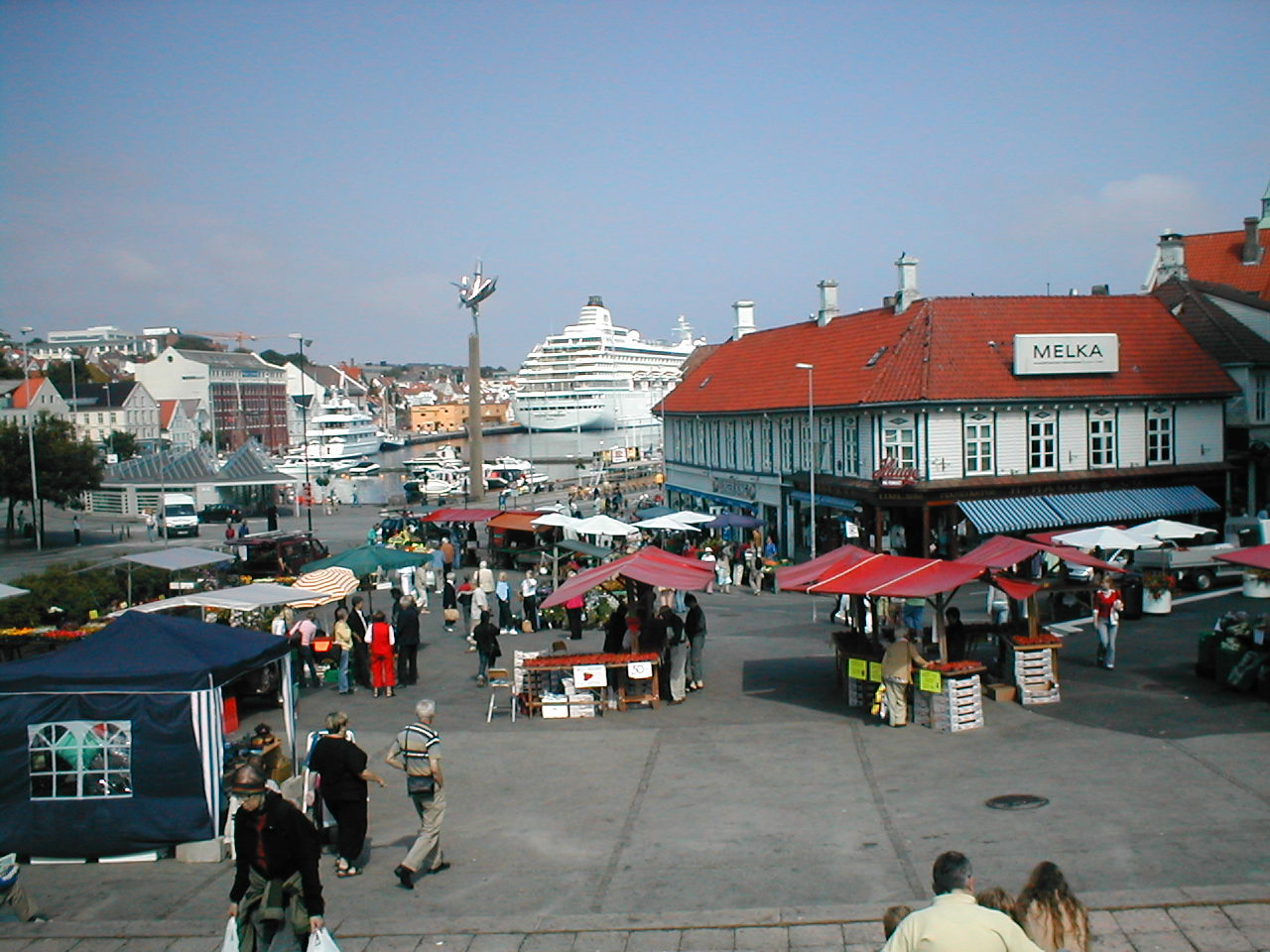 Stavanger market, looking out over the harbour.